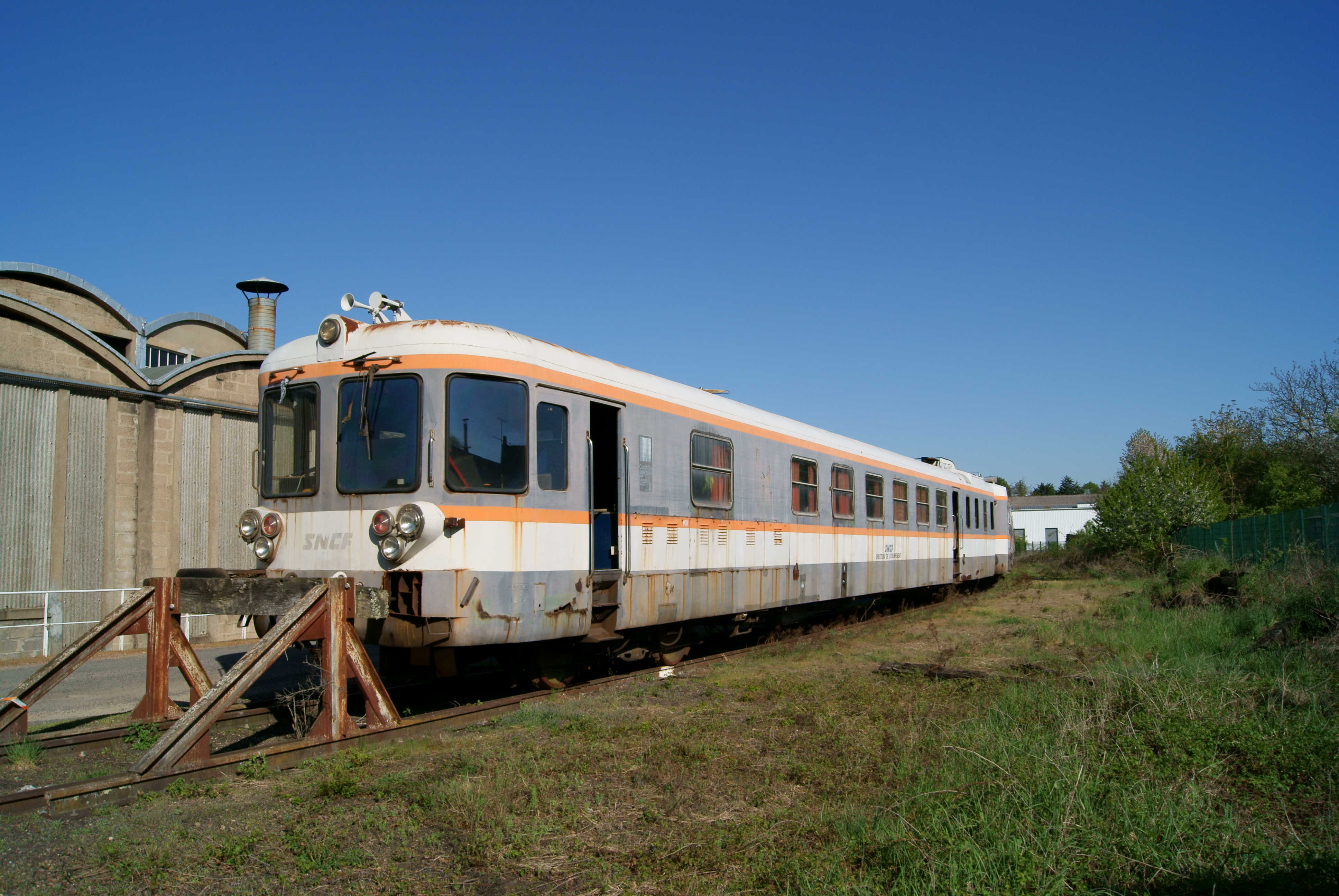 Le X 2700 aussi appelé V4